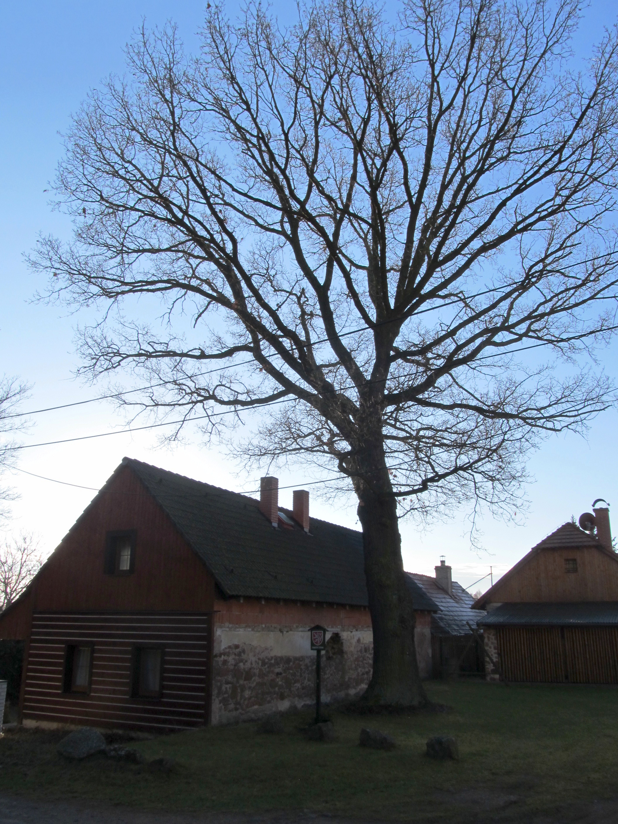 Smrk (Čistá) - památný dub